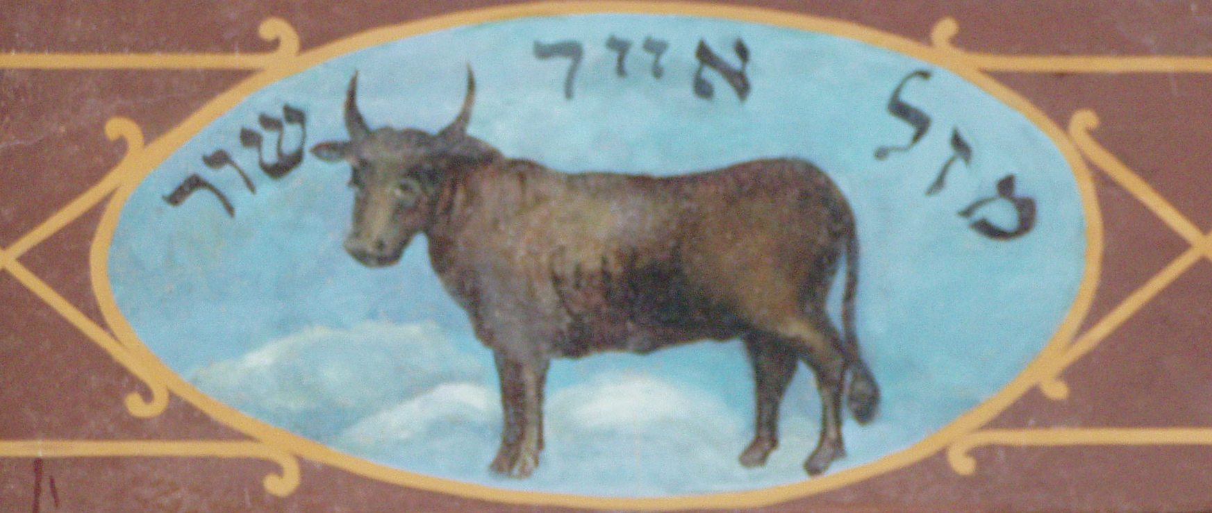 Znaki zodiaku na belkowaniu galerii dla kobiet synagogi Kupa w Krakowie